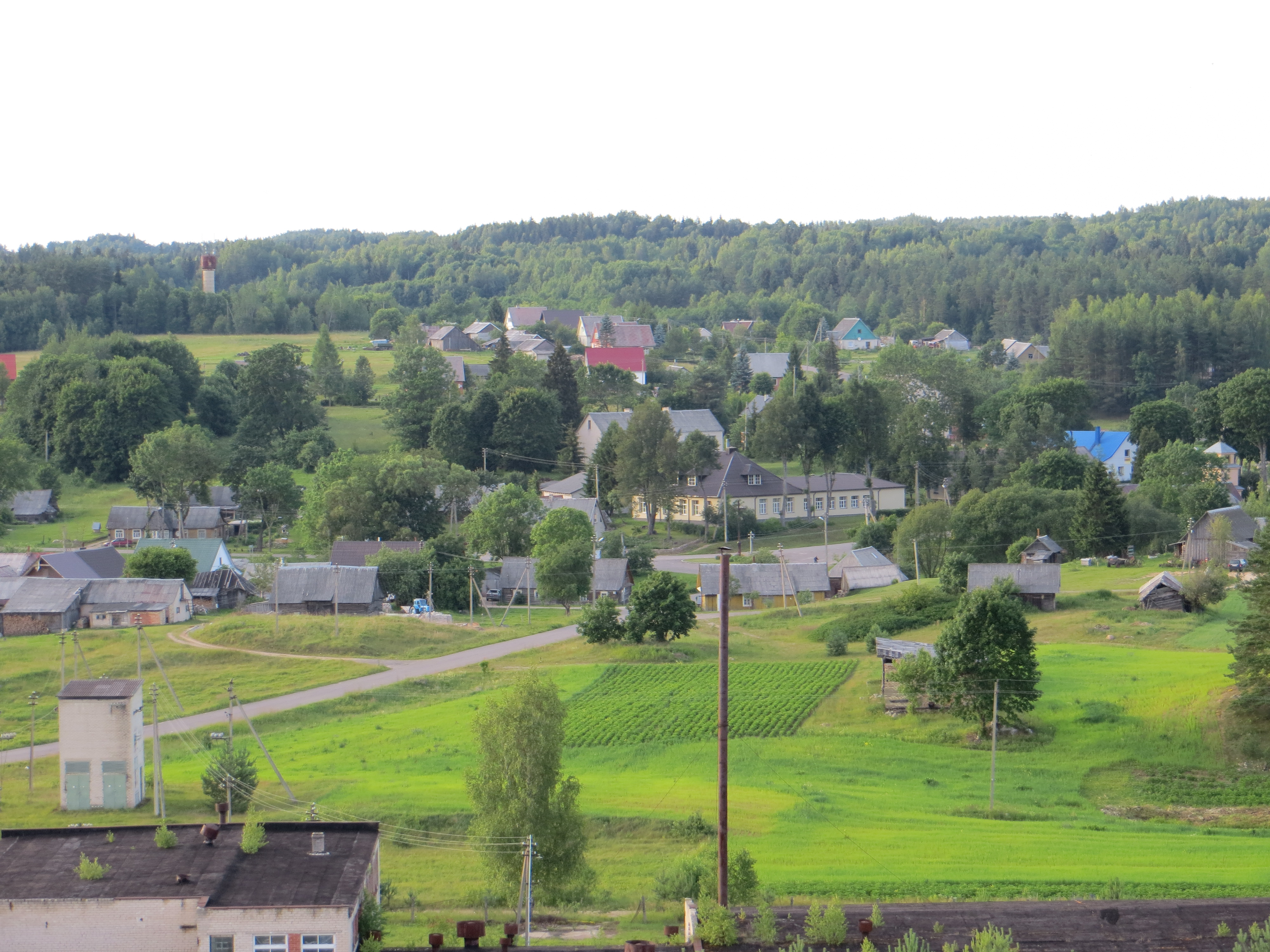 Ceikiniai, Lithuania